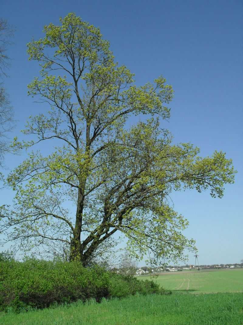 Klon zwyczajny rosnący na cmentarzu ewangelickim w Zalesiu.